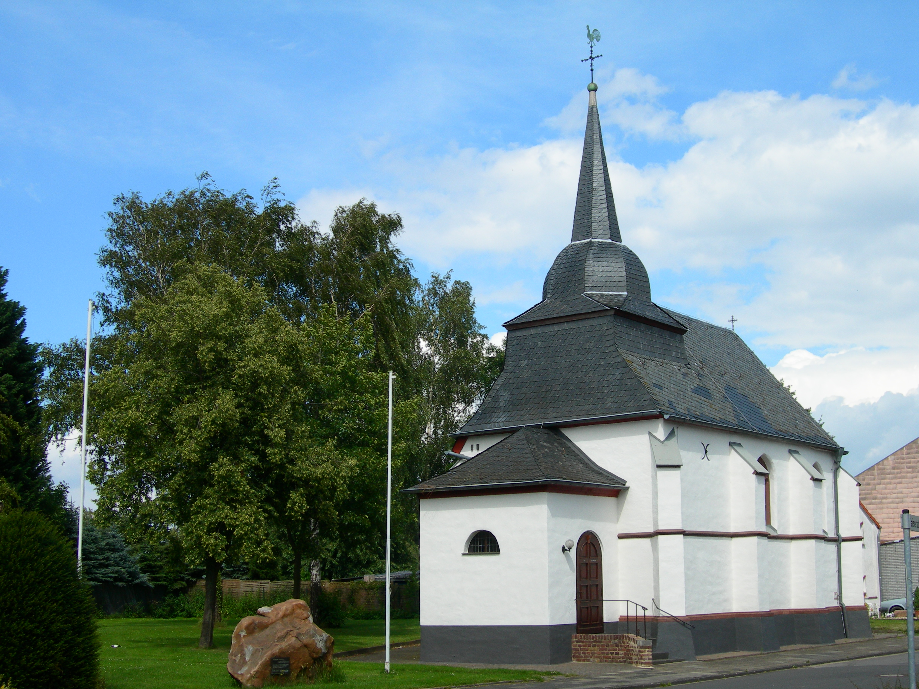 Kapelle St.Katharina Hoellen